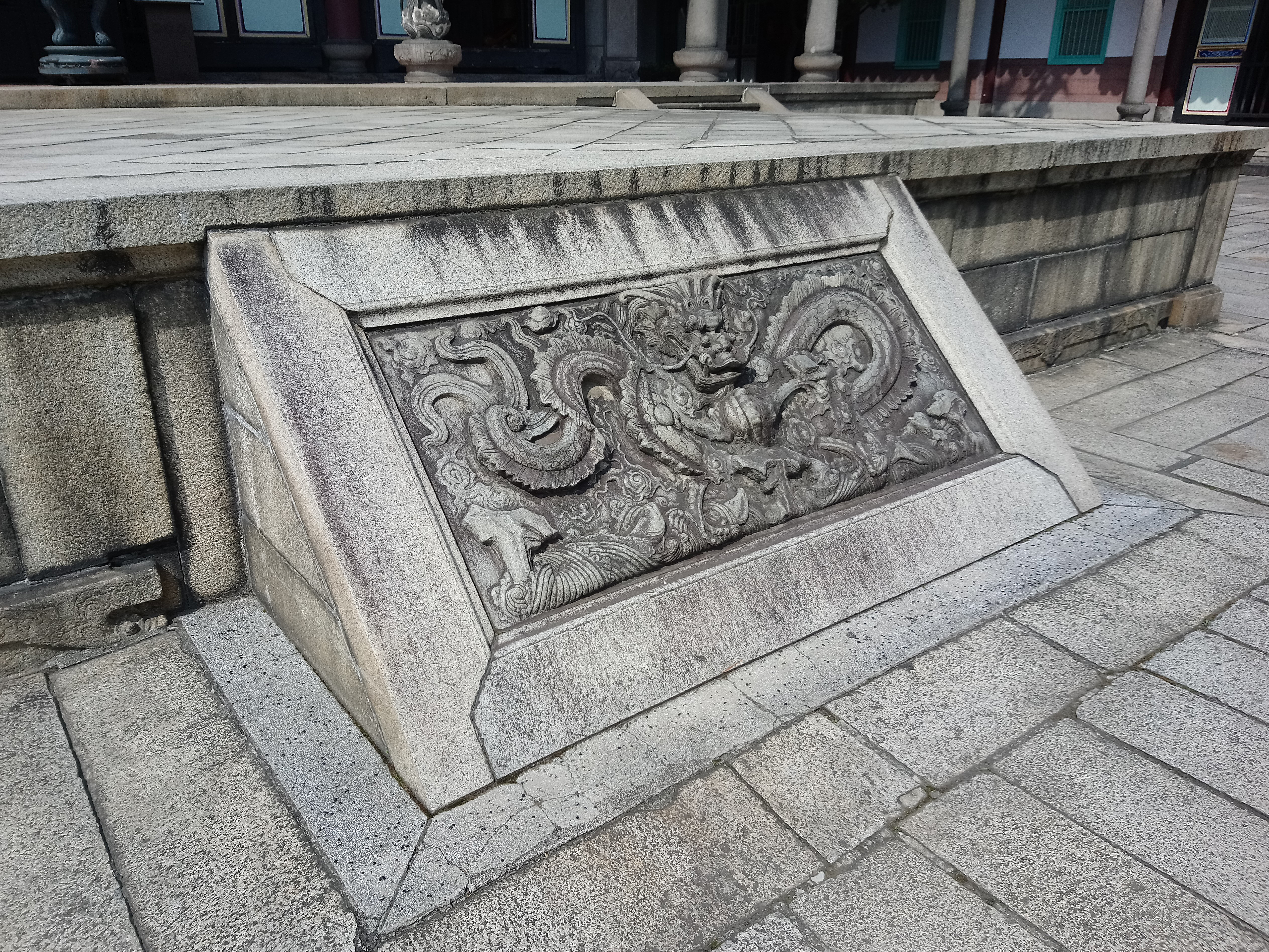 臺北孔子廟大成殿御路,臺北市大同區大龍次分區保安里